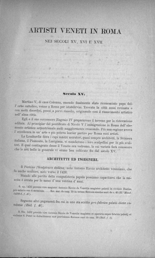 Incipit